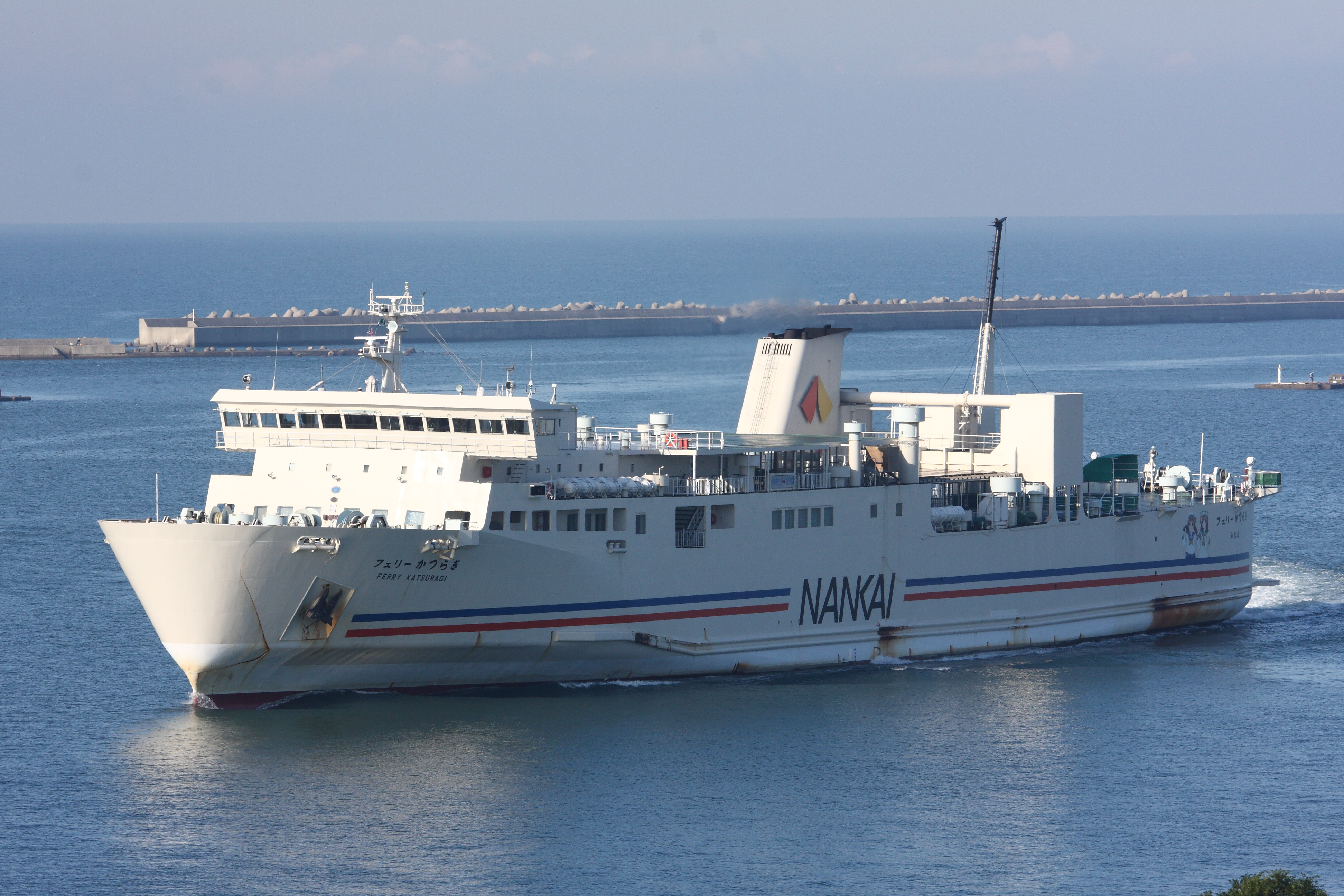 南海フェリー かつらぎ丸 和歌山港入港 青岸橋より撮影